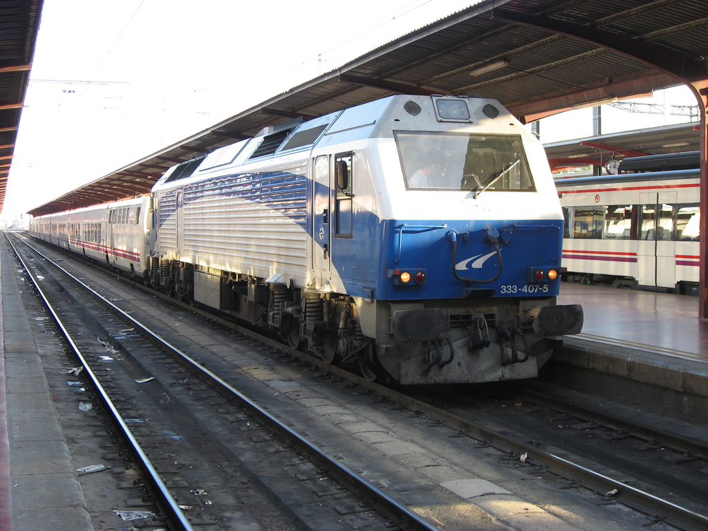 El Trenhotel Lusitania Lisboa-Madrid llegando a la estación de Madrid Chamartin con la locomotora 333.407 de Renfe